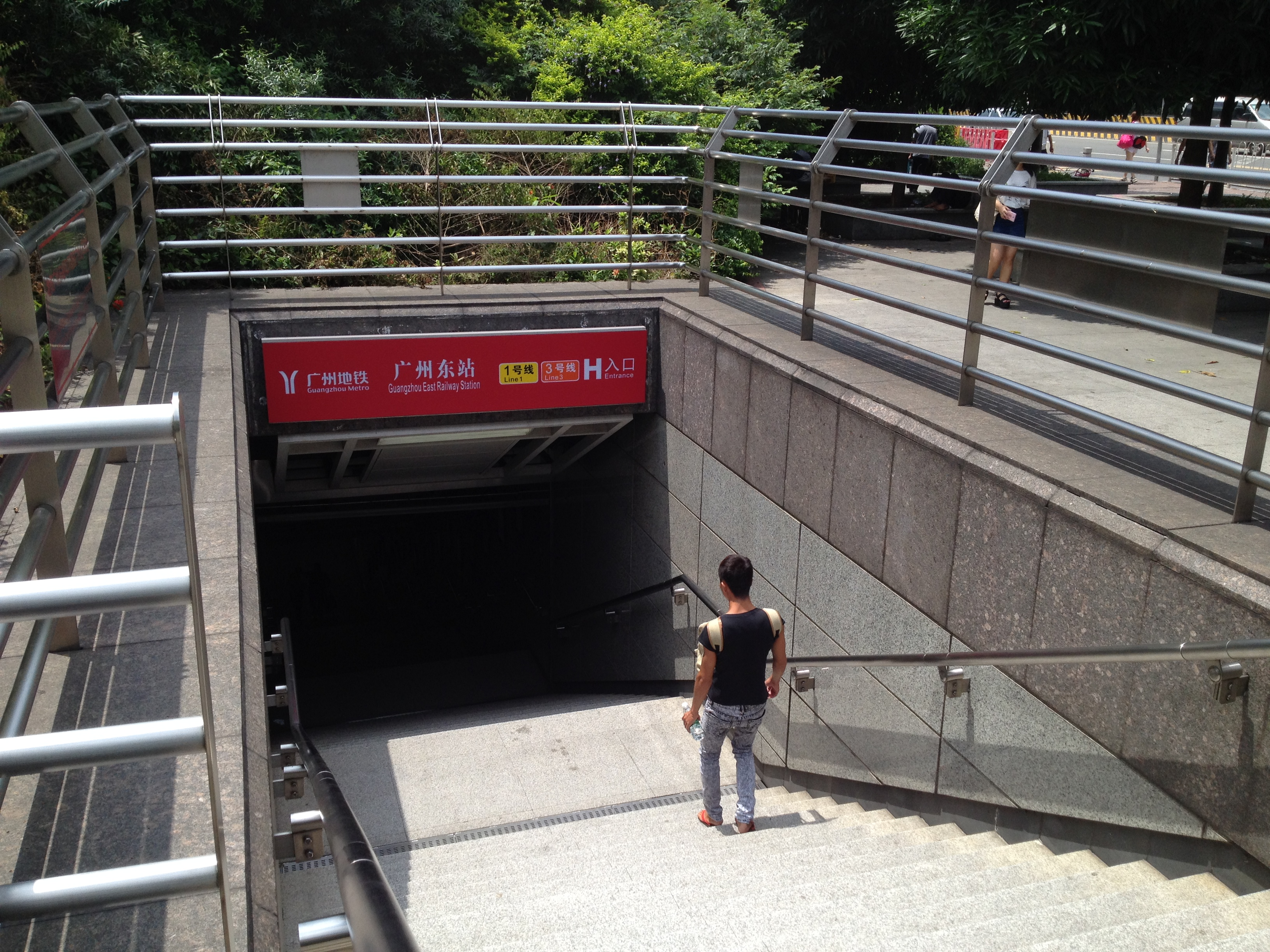 广州地铁广州东站H出入口